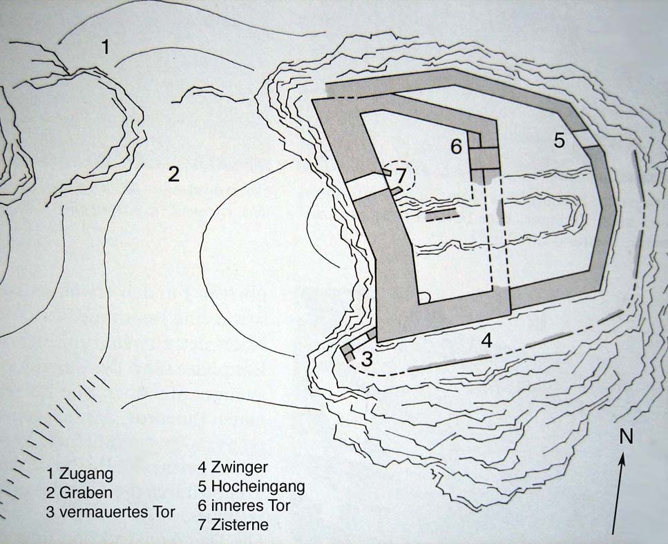 Bearbeitung eines Plans von Obertagstein